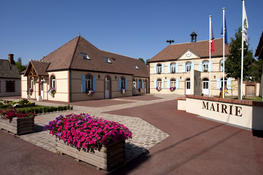 mairie